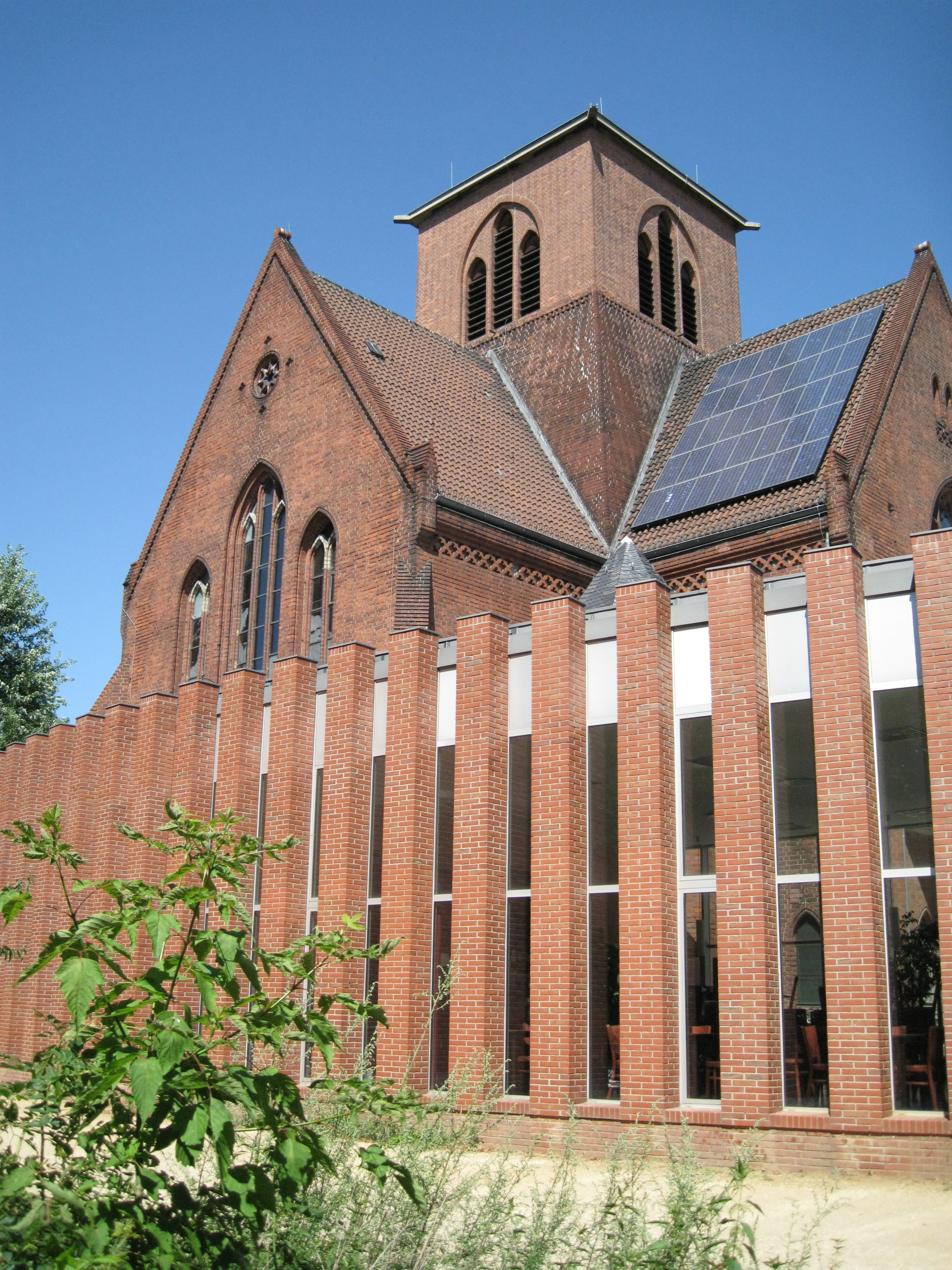 Cafe im Anbau der Genezarethkirche